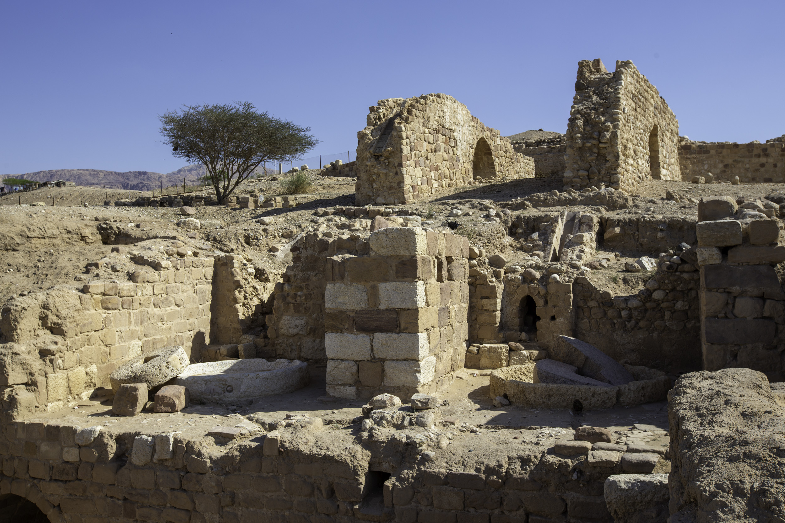 Al Safi Sugar Cane Factories (1)